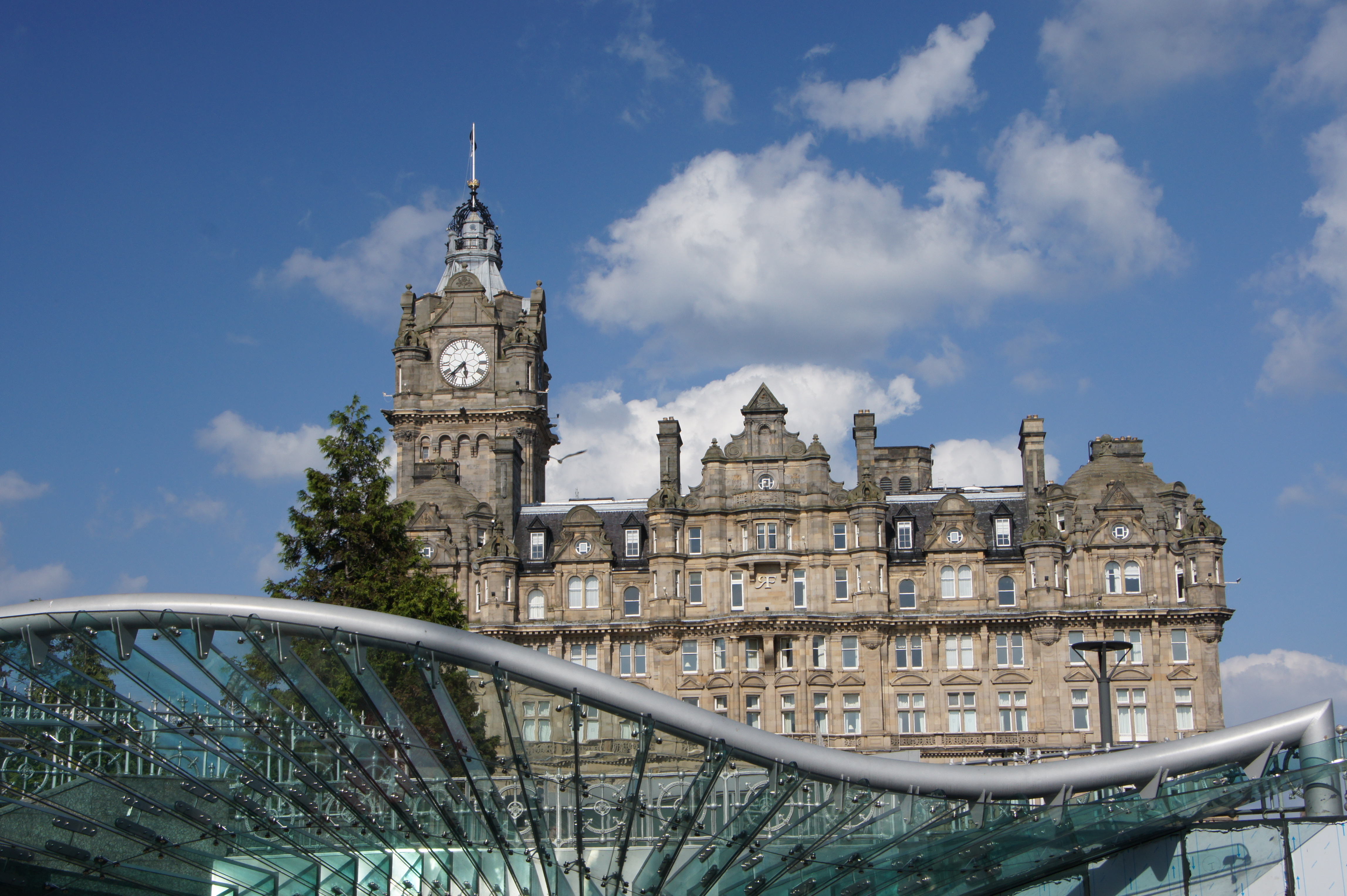 edinburgh